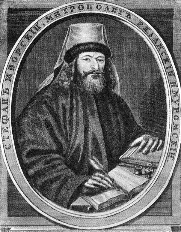 Митрополит Стефан Яворский